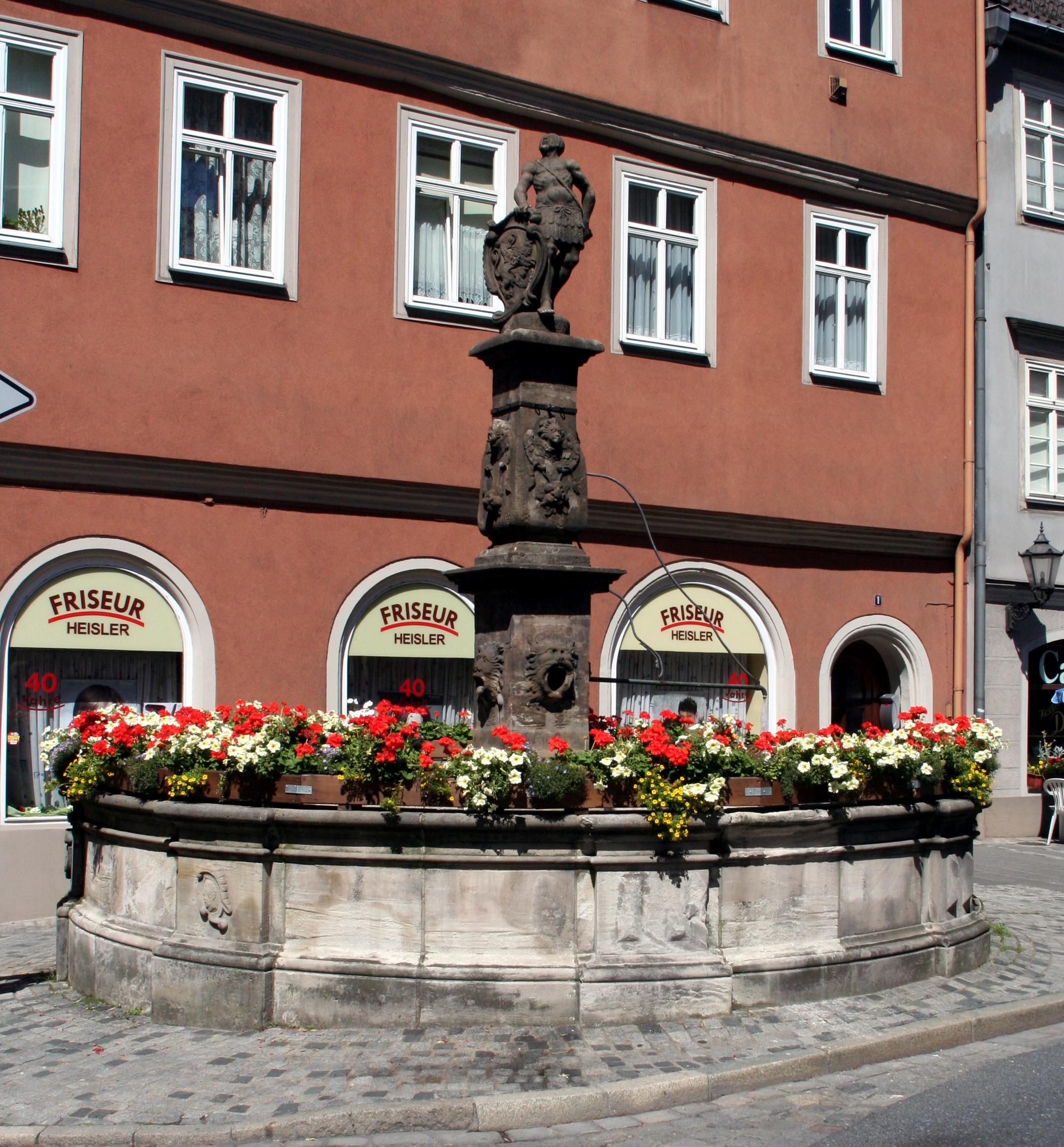 Brunnen vor Rückertstraße 1 in Coburg